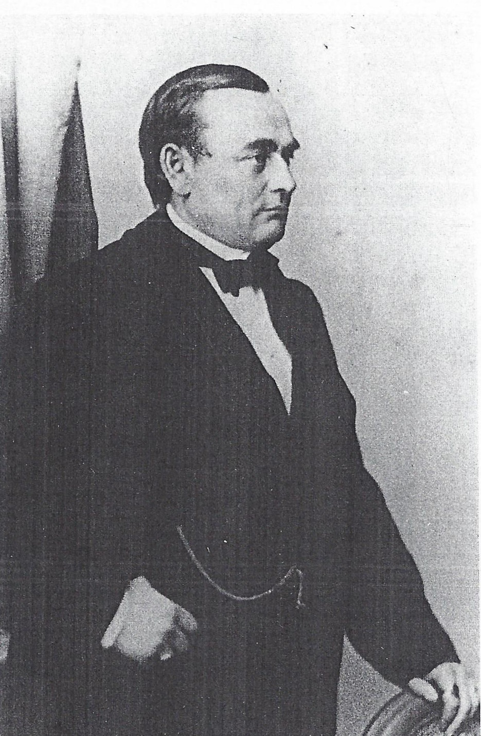 Porträtfotografie von Georg Curt von Einsiedel